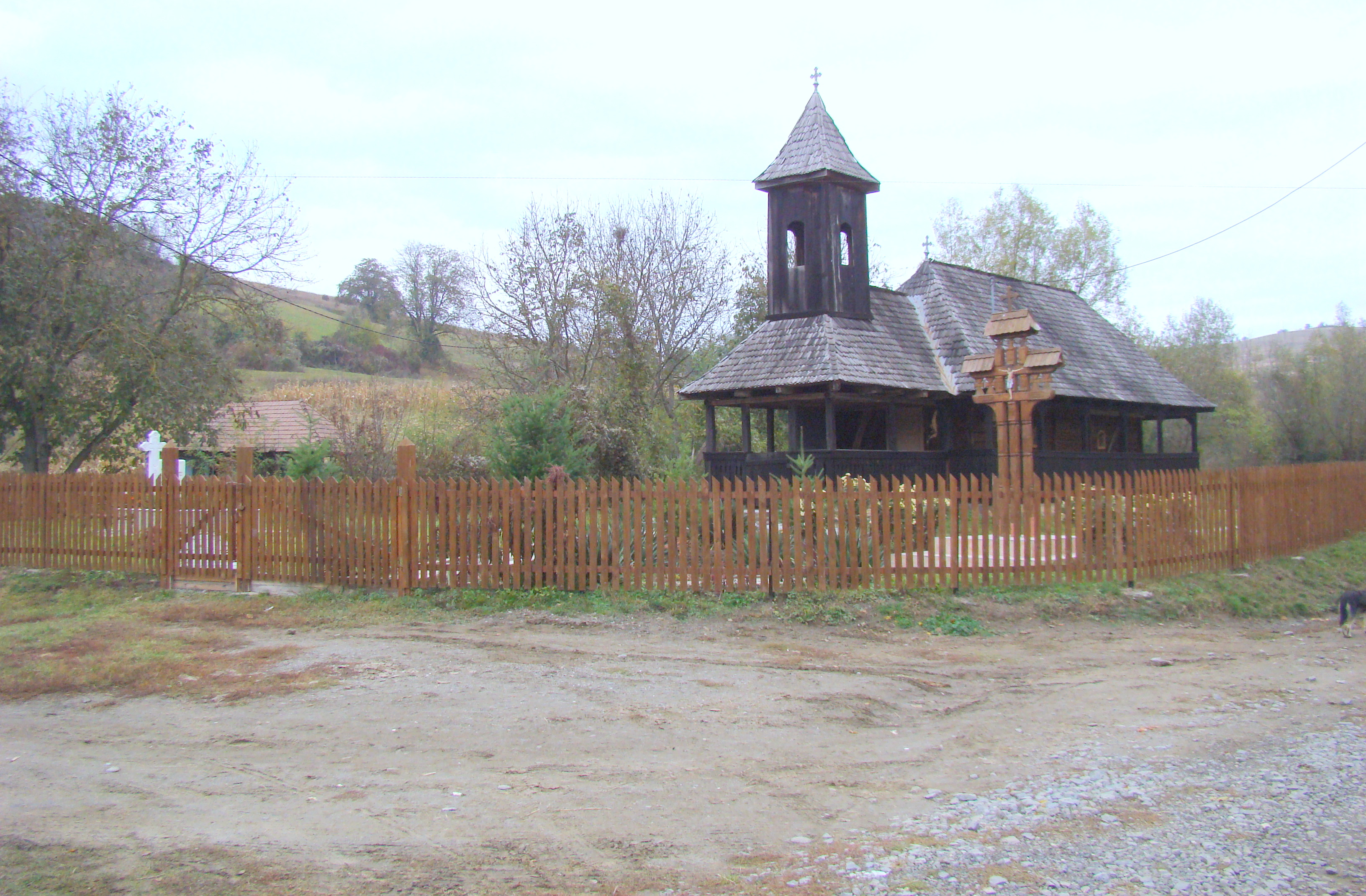 Biserica de lemn din Sânișor, comuna Livezeni, județul Mureș